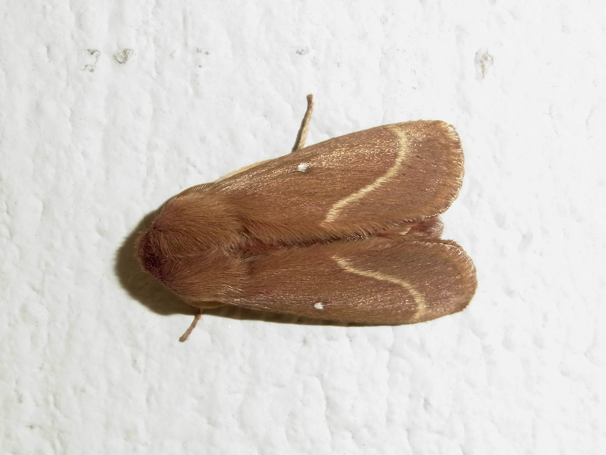 Kleespinner (Lasiocampa trifolii), Skala Prinos, Thasos/Griechenland